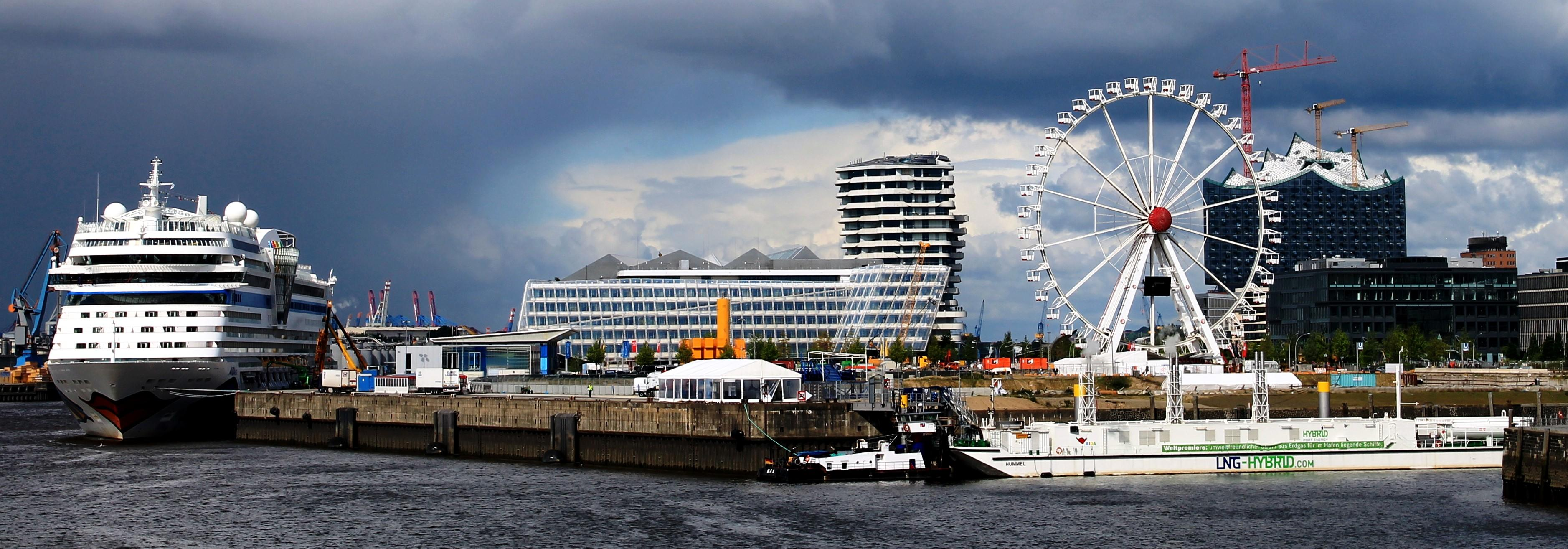 DasKreuzfahrtschiff Aidasol wird in Hamburg von der LNG-Power-barge mit Strom versorgt. Weltpremiere, mit dem Brennstoff LNG wird Strom für ein Kreuzfahrtschiff erzeugt